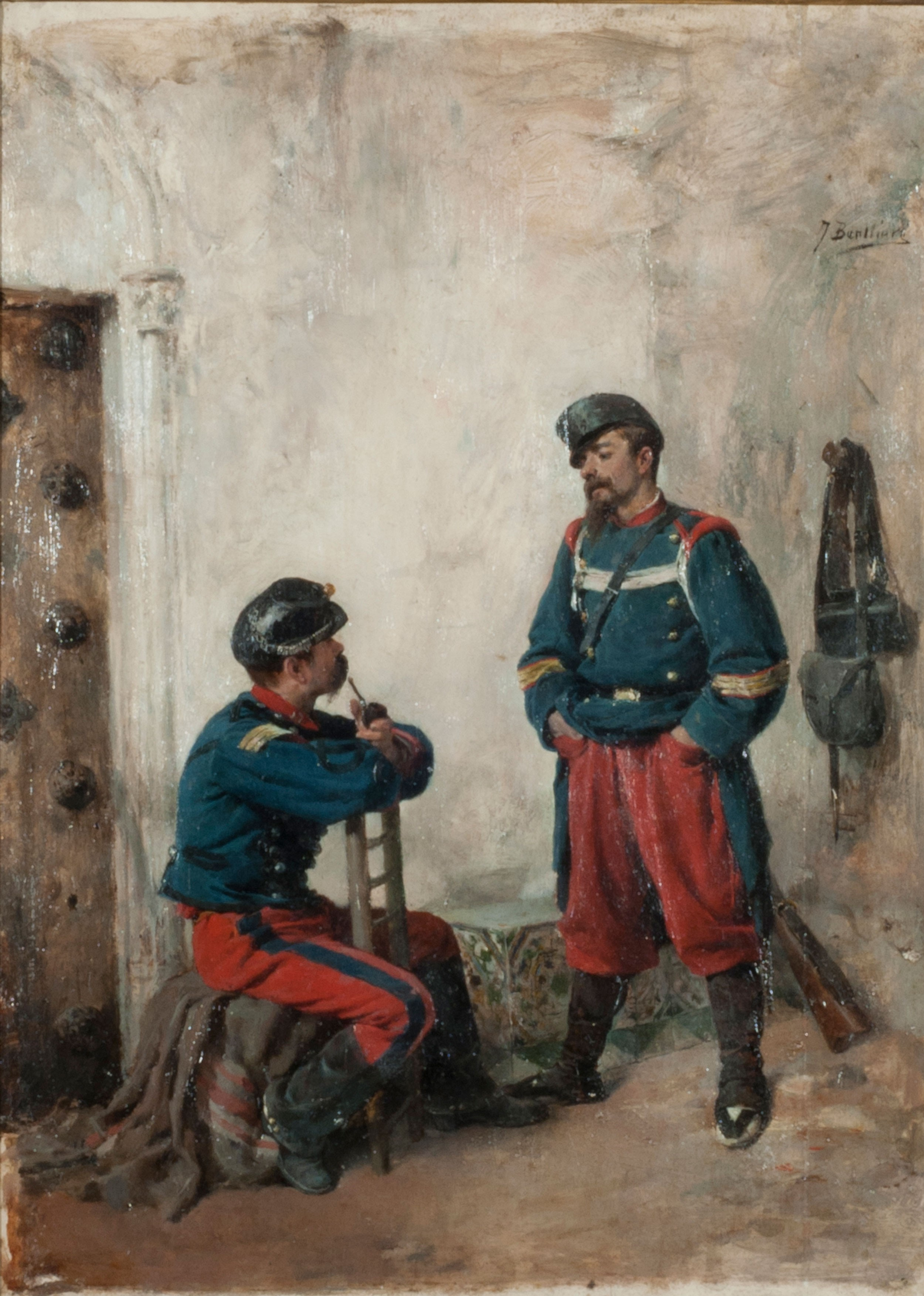 José Benlliure, Dos soldados. Siglo XIX. 32,3 x 23,7 cm, con marco: 55 x 46,5 x 6,3 x 13 cm, óleo sobre tabla. Inv. 5468.